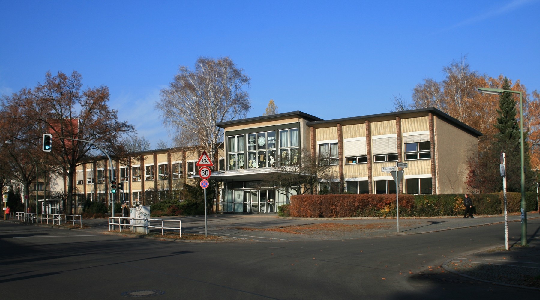 Berlin-Tegel, Ziekowstraße 80-88. Hoffmann v. Fallersleben-Schule.